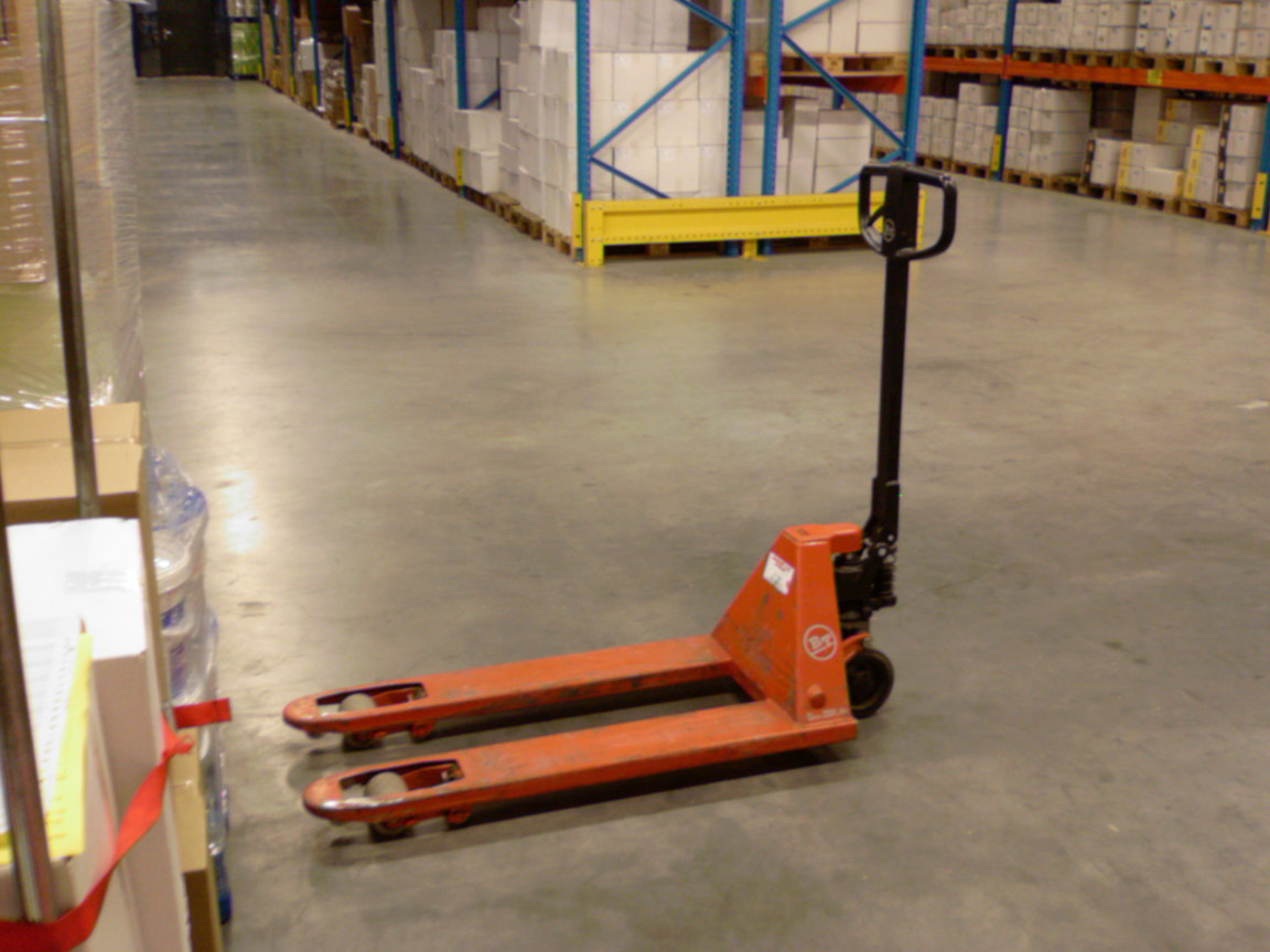 muddi aller